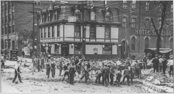 Hotel Spadina in 1921.